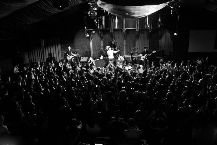 Антитела в Полтаве 2